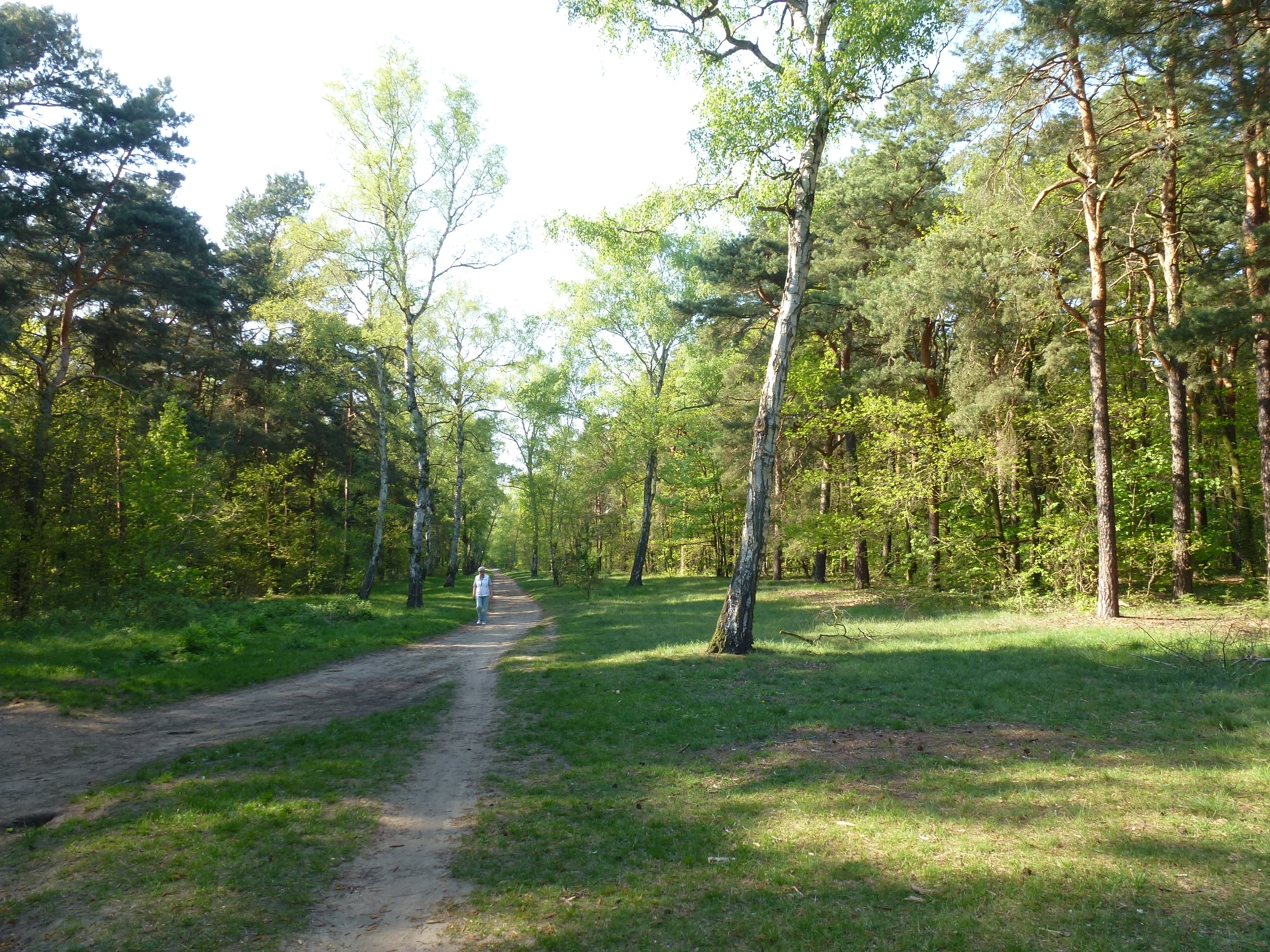 Berlin-Adlershof Birkenweg